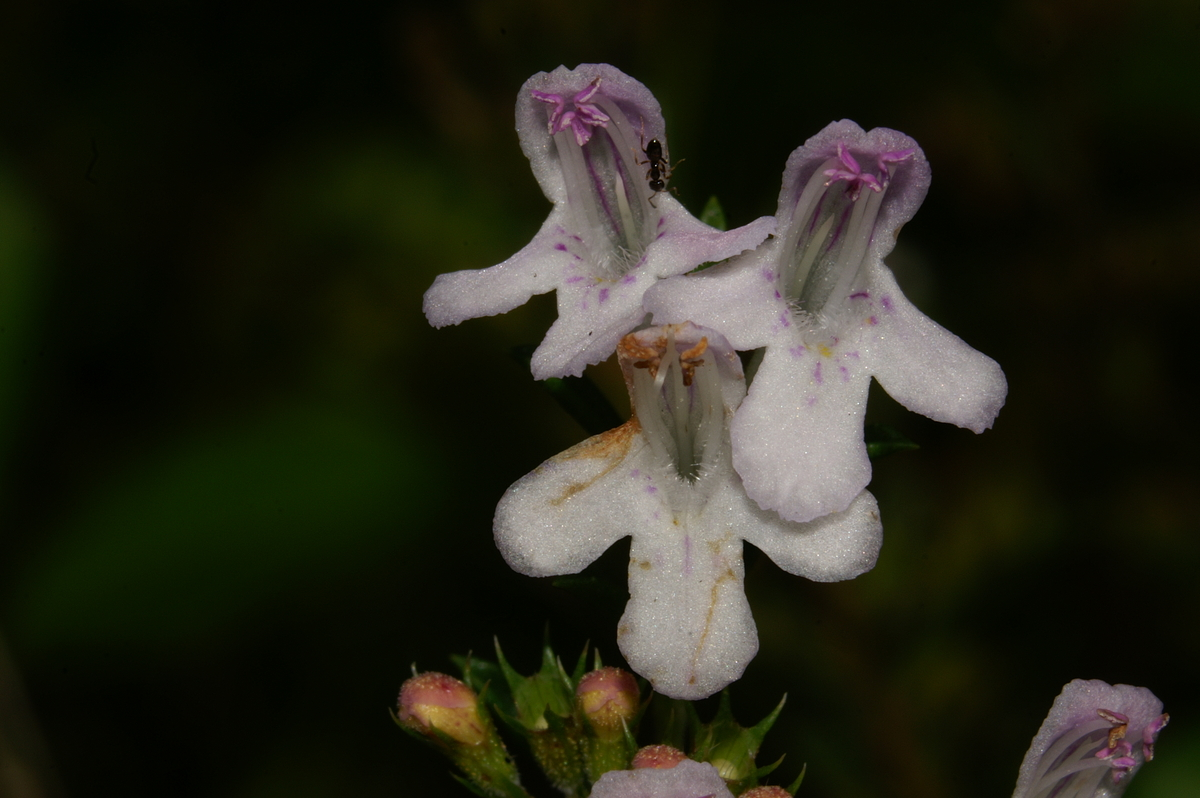 Kraški šetraj v Golem Brdu.